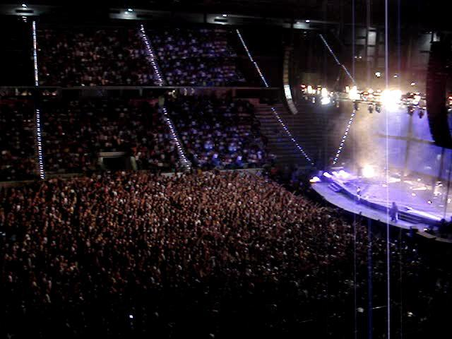 self made - foto personale